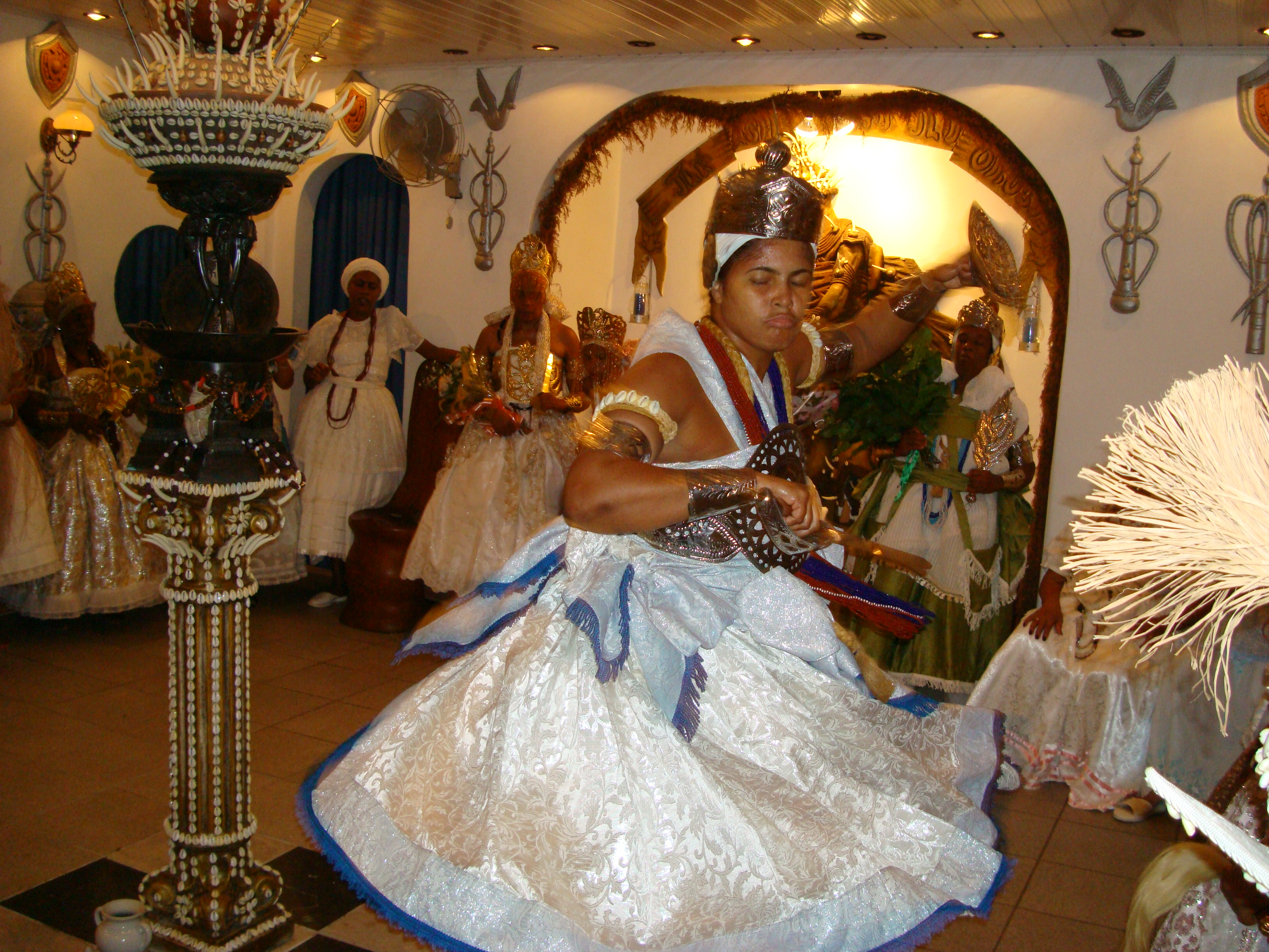 Ogum - Orixá do ferro, dos ferreiros e dos caminhos, Candomblé, Salvador, Bahia, Brasil